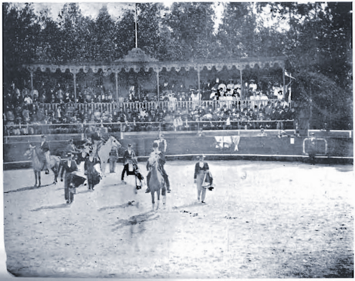 Corrida de toros en Villa Colon (Montevideo)